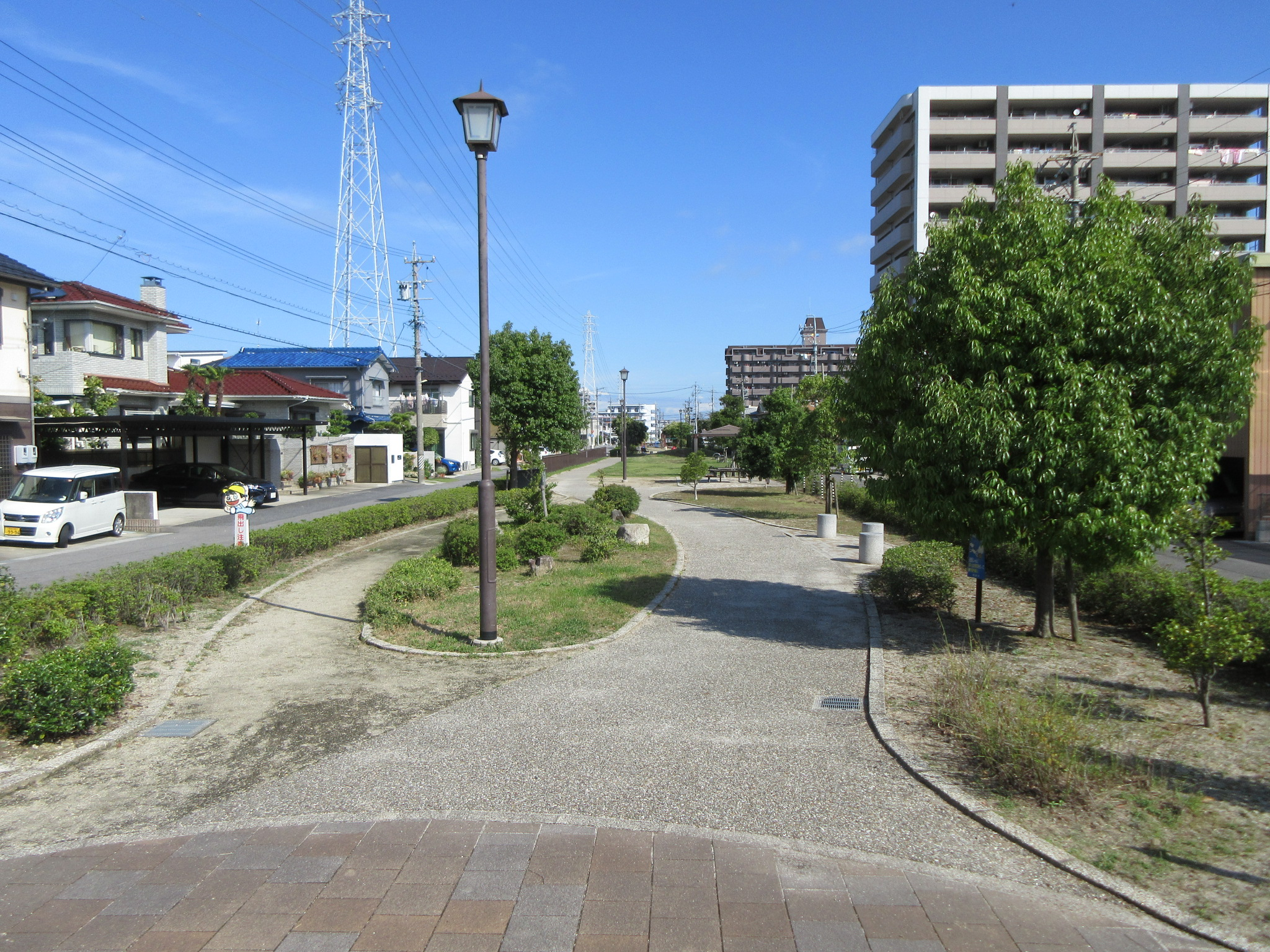 岡崎市日名南町。埋め建てられた早川。